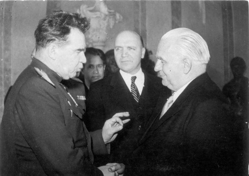 Berlin, 75. Geburtstag Wilhelm Piecks ADN-ZB-Illus-Heilig Geburtstagsempfang für Präsident Pieck. Am 3.11951, seinem 75. Geburtstag, hielt Präsident Pieck in seinem Amtssitz in Berlin-Niederschönhausen einen Geburtstagsempfang ab. U.B.z.: Der Vorsitzende der sowjetischen Kontrollkommission Armeegeneral Tschuikow gratuliert dem Präsidenten. In der Mitte der politische Berater Botschafter Semjonow. Abgebildete Personen: Pieck, Wilhelm: Präsident, Politbüro der SED, Vorsitzender der KPD, DDR Semjonow, Wladimir: Hochkommissar in Deutschland, Botschafter in der DDR und in der Bundesrepublik Deutschland, Sowjetunion Tschuikow, Wassili Iwanowitsch: Marschall, Oberbefehlshaber der Streitkräfte in Deutschland, Chef der Kontrollkommission in der DDR, Vaterländischer Verdienstorden (VVO) in Gold 1960, Sowjetunion (GND 118666266)